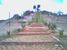 APA